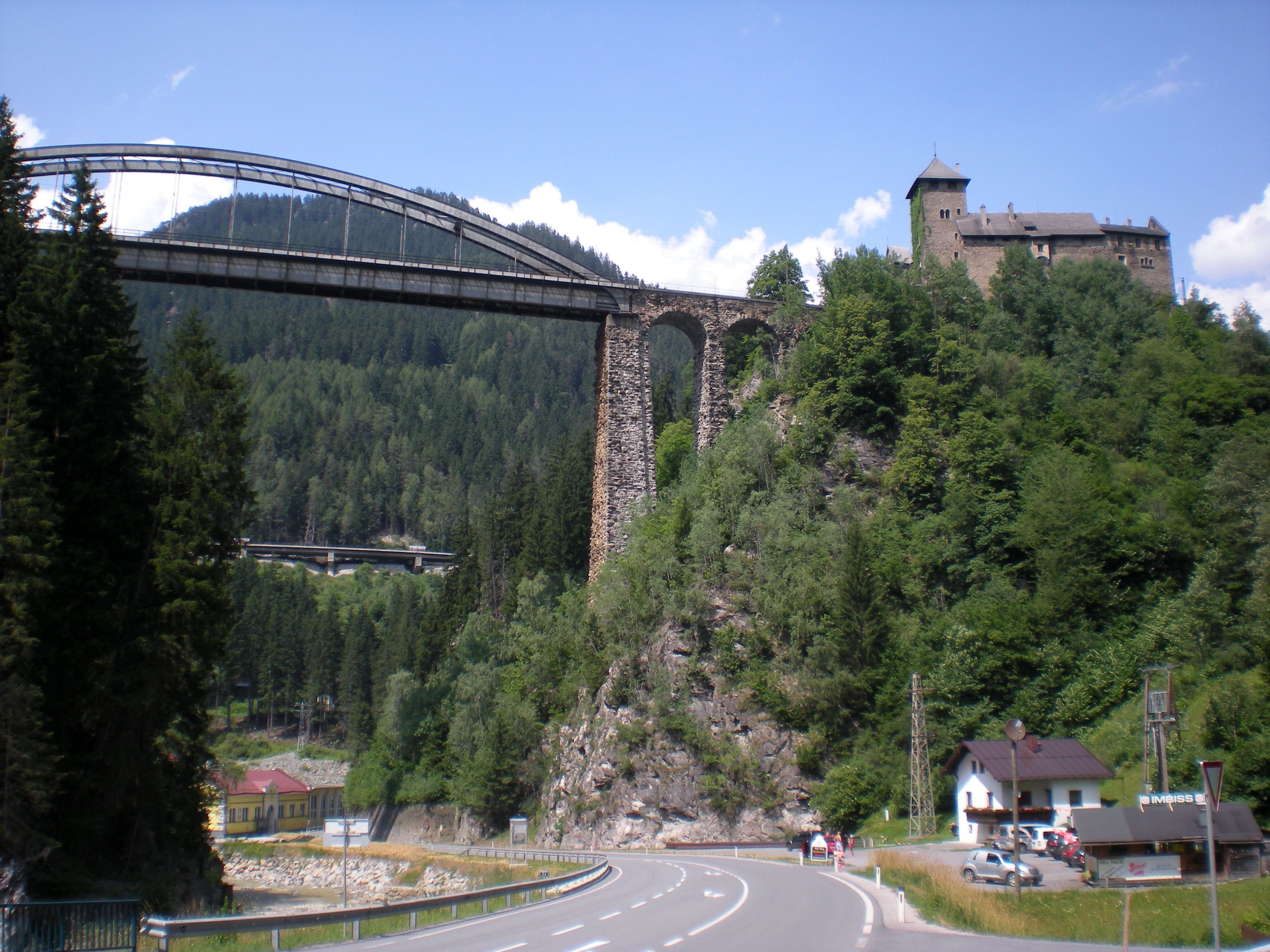 El Trisannabrücke es un puente ferroviario de 86 m de altura y 225 m de longitud, bajo el que pasa la carretera B188. Cerca del puente está el Burg Wiesberg, un castillo medieval restaurado en el siglo XIX.